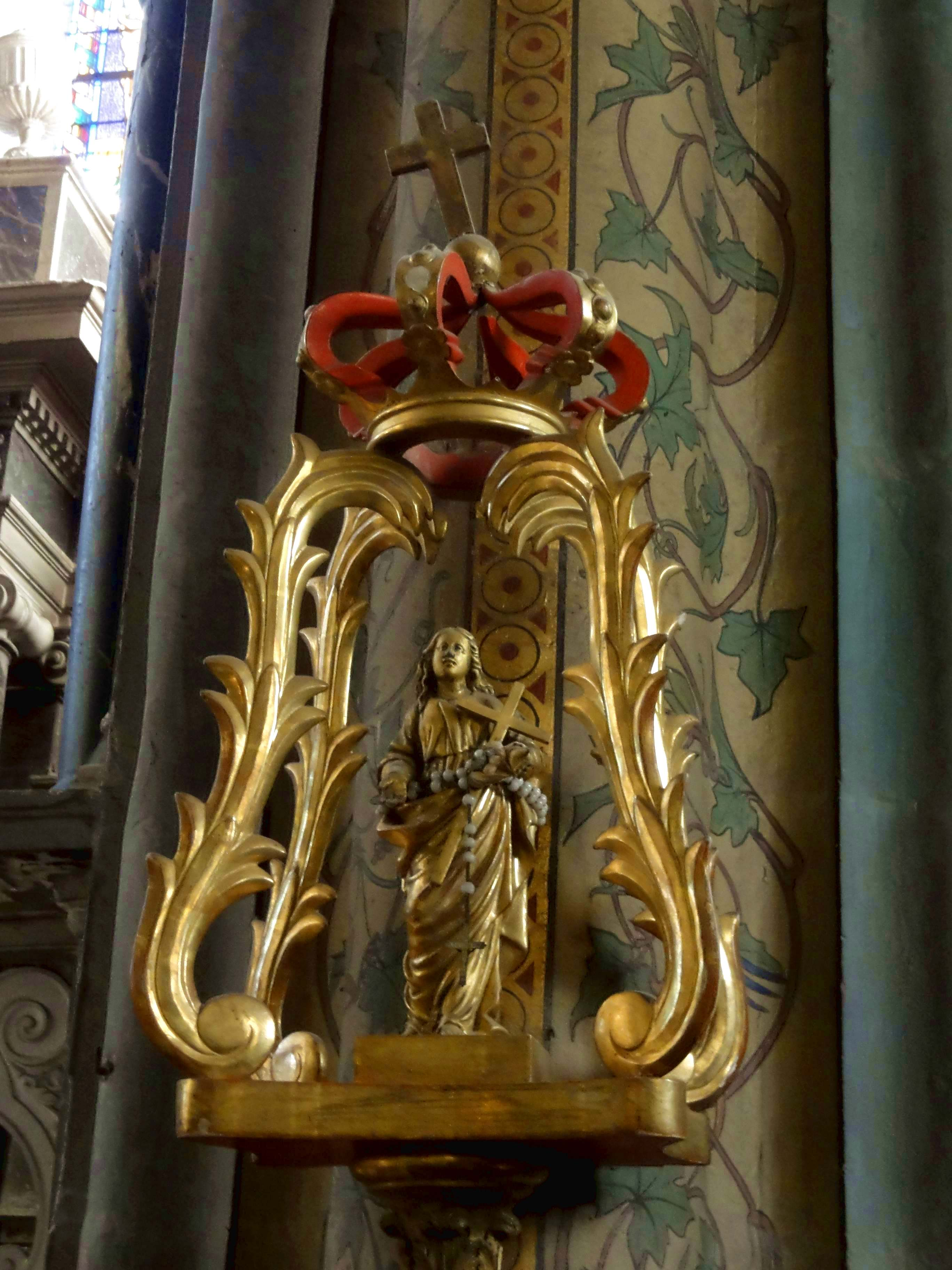 Voir titre.